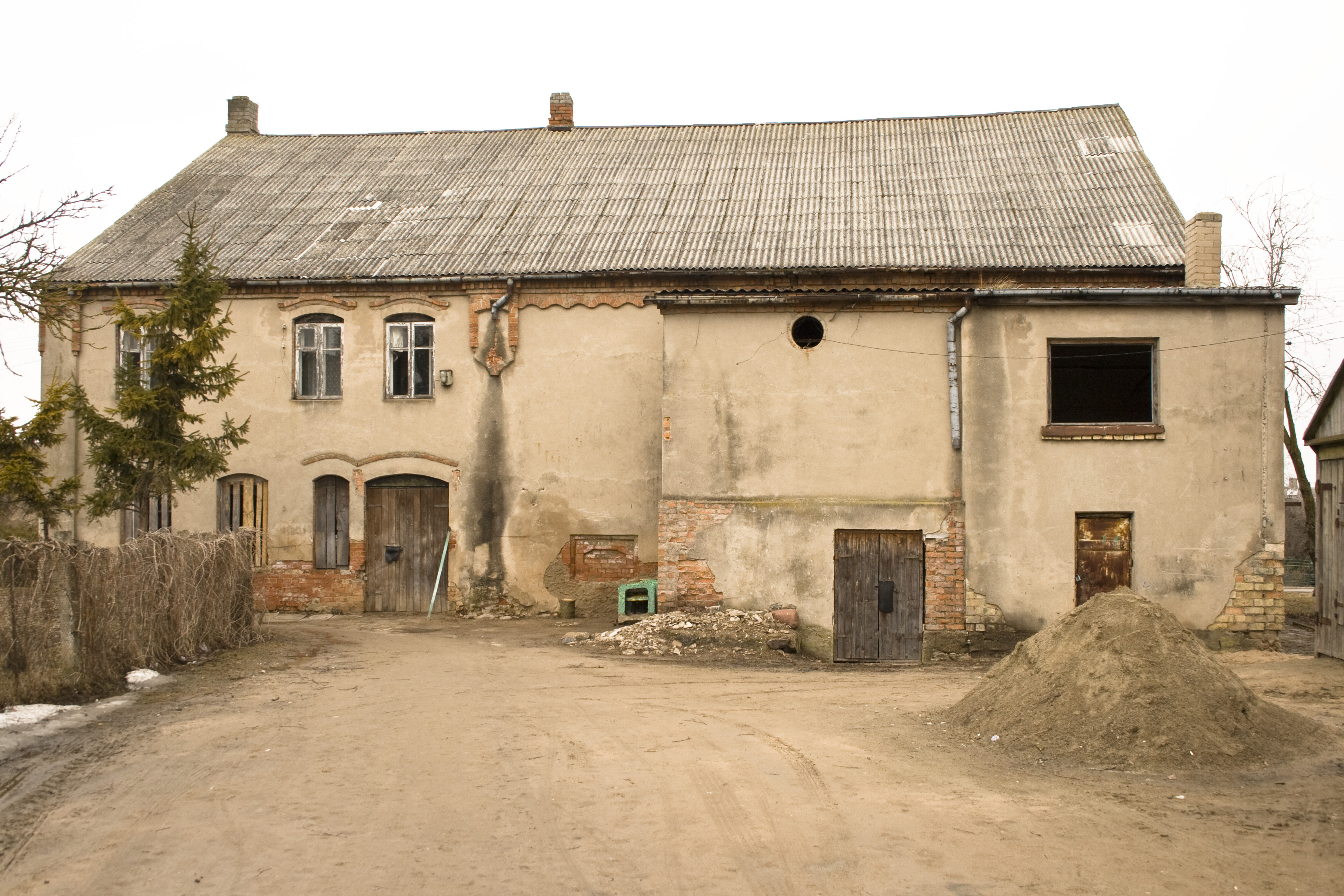 Linkuva synagogue